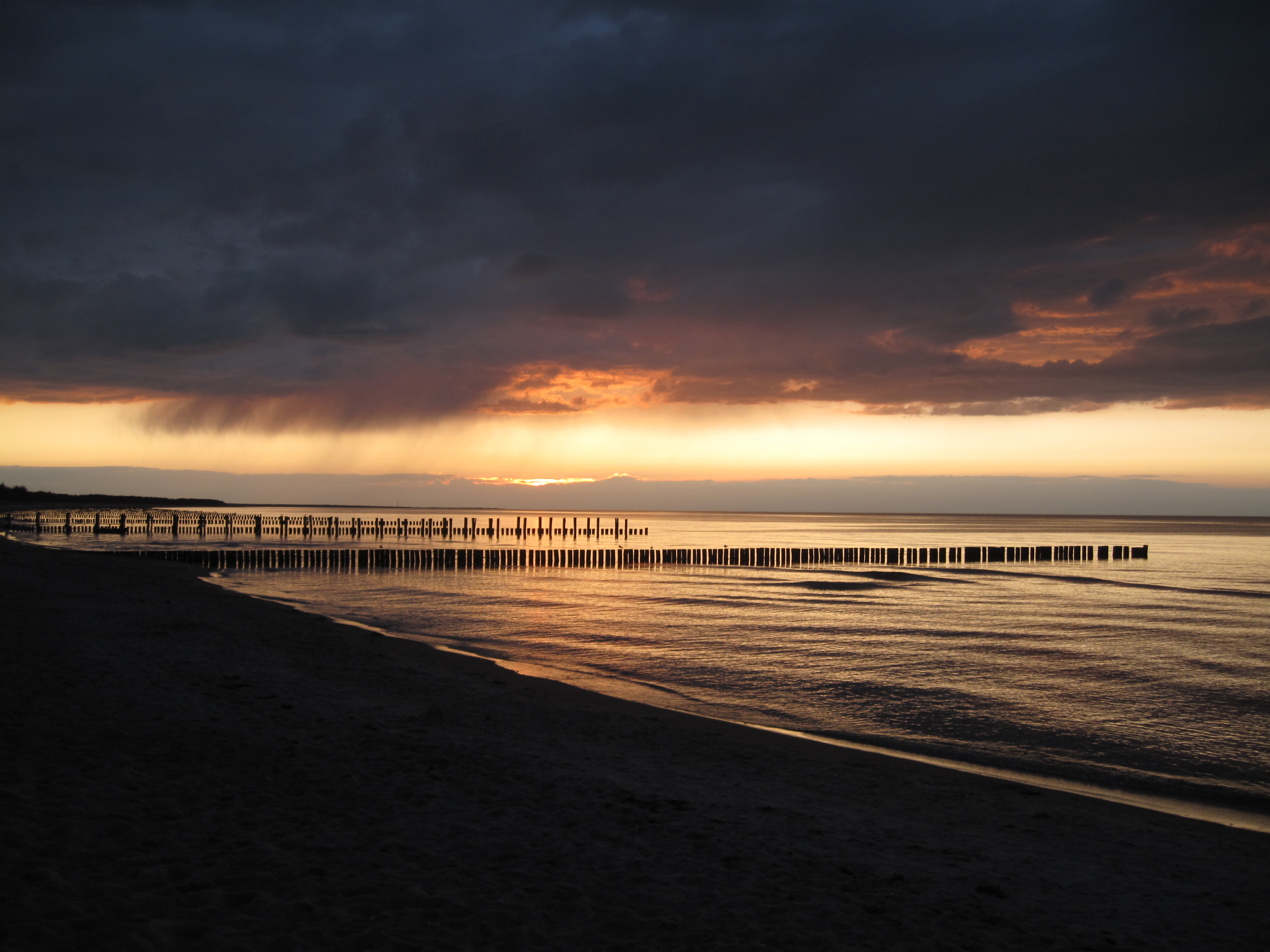 Strand bei Zingst